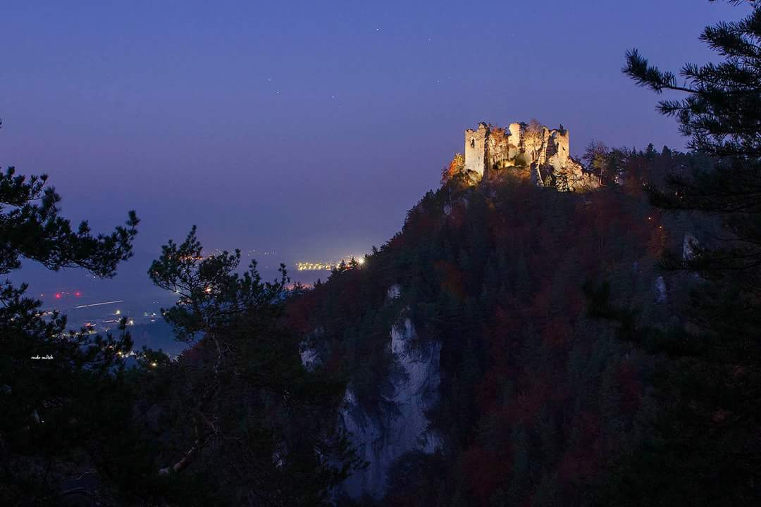 Hrad Hričov prvý krát nasvietený 31.10.2015